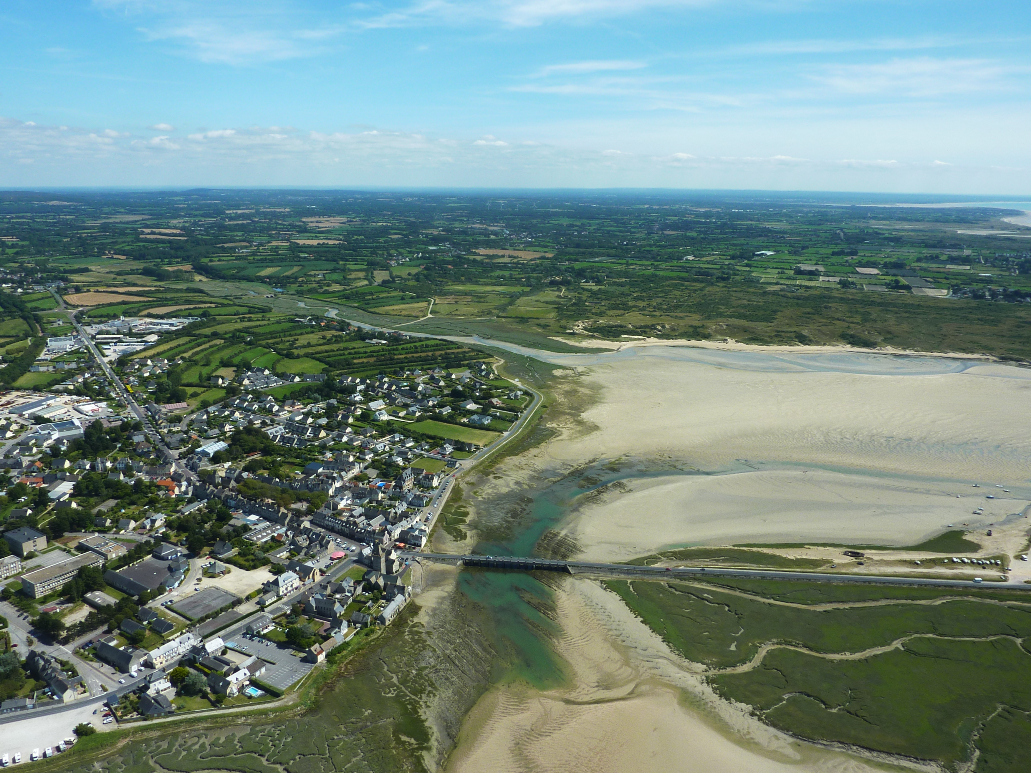 Prise de vue d'ULM de la ville de Portbail (50) et de son Havre